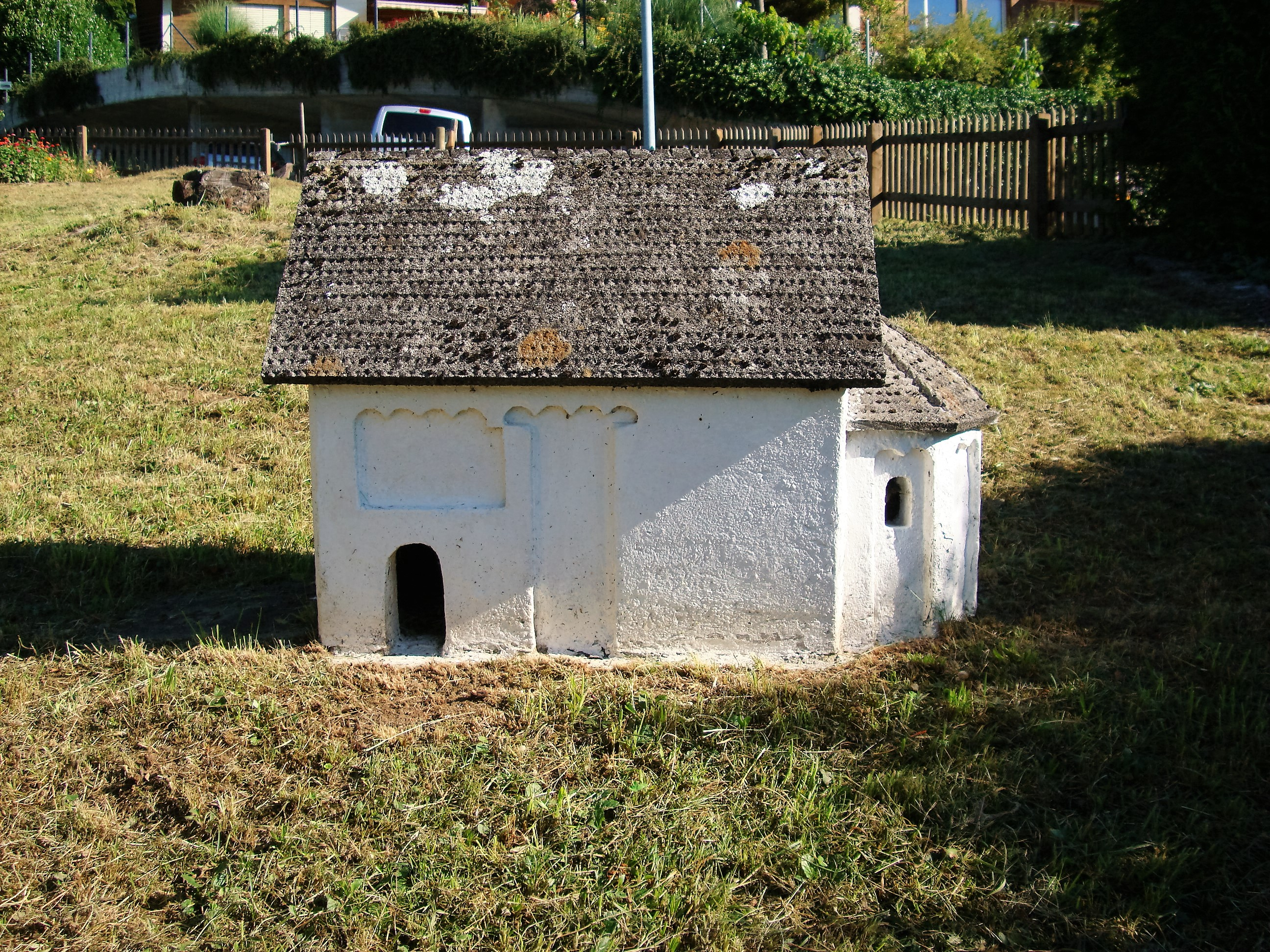 Die Fotografie zeigt das von Ernst Amstutz (1910-1975) gebaute Modell der St. Columban Kapelle in Faulensee. Das Modell steht im Garten des Patenkindes, Ernst Turtschi, des Erbauers.